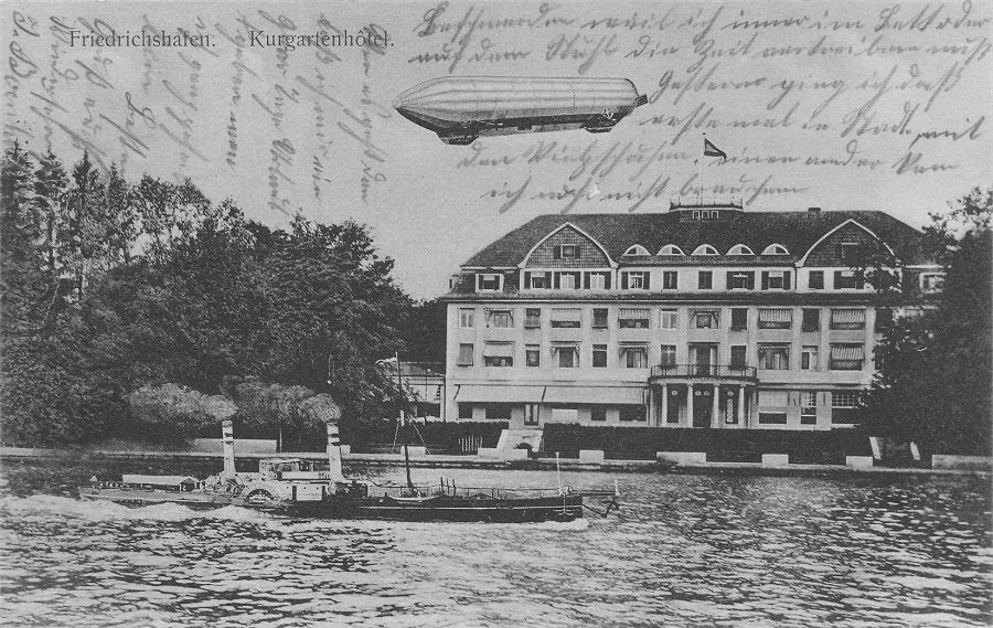 Gelaufene Postkarte mit einem Zeppelin über dem Kurgartenhotel in Friedrichshafen